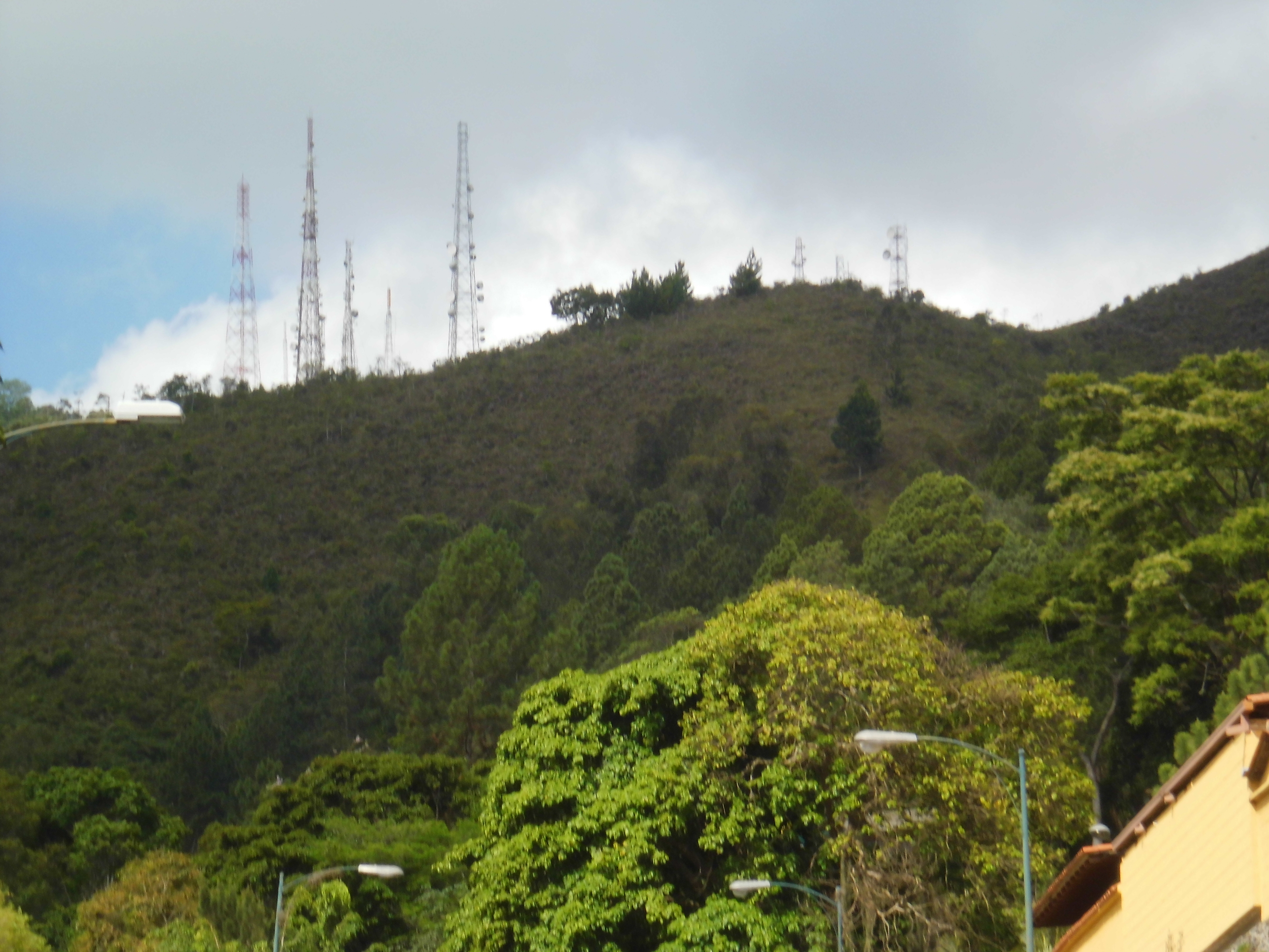 Cerro El Volcán visto desde la urbanización La Boyera, Municipio El Hatillo, estado Miranda Venezuela.